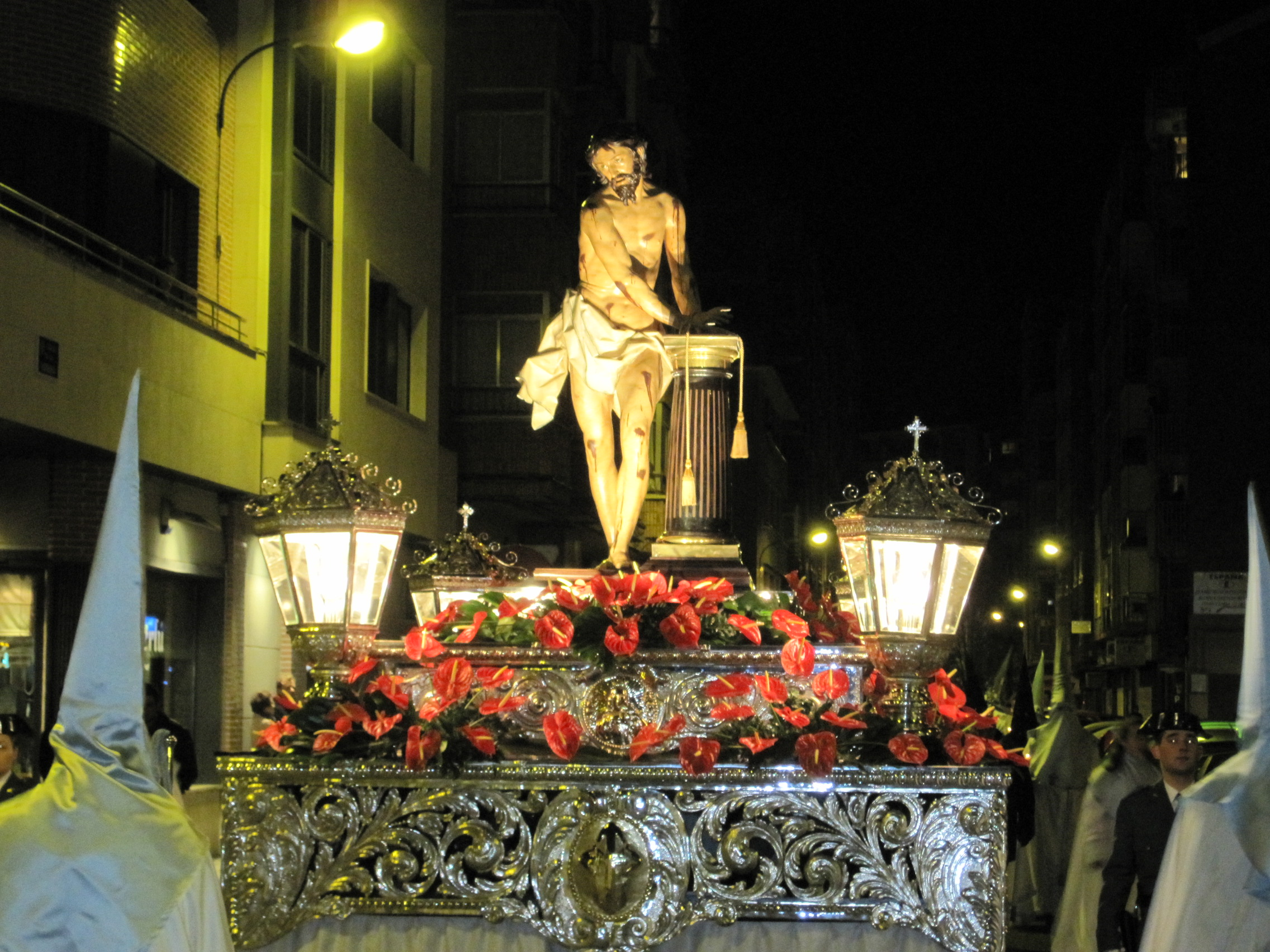 El Señor Atado a la Columna. Hermandad Penitencial de Nuestro Padre Jesús atado a la Columna, Valladolid (España).